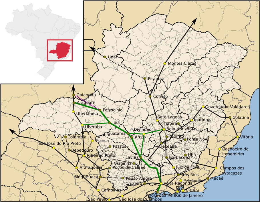 Mapa do estado de minas gerais destacando a Rede Mineira de Viação